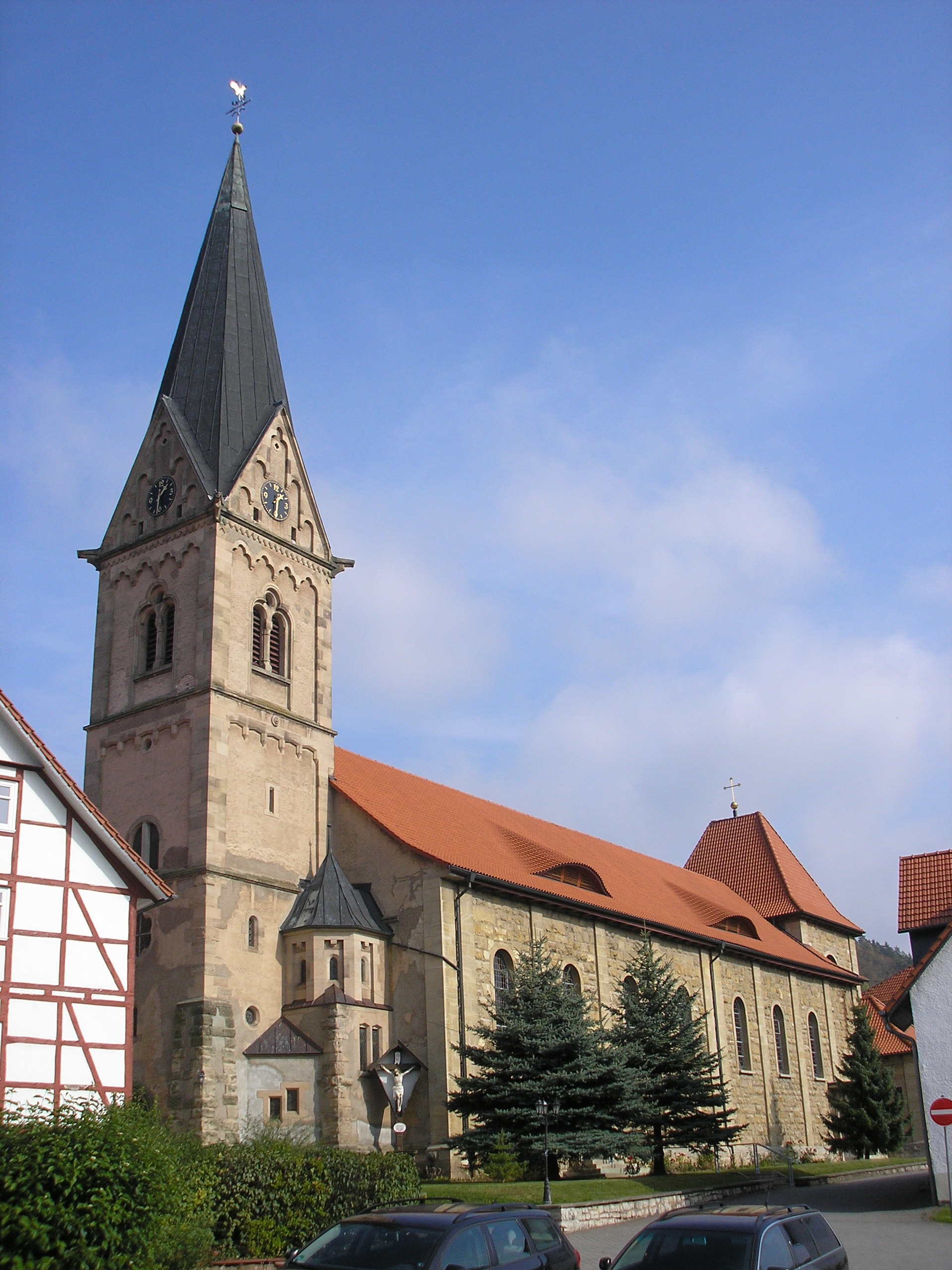 Die Kirche in Geismar (Thüringen).